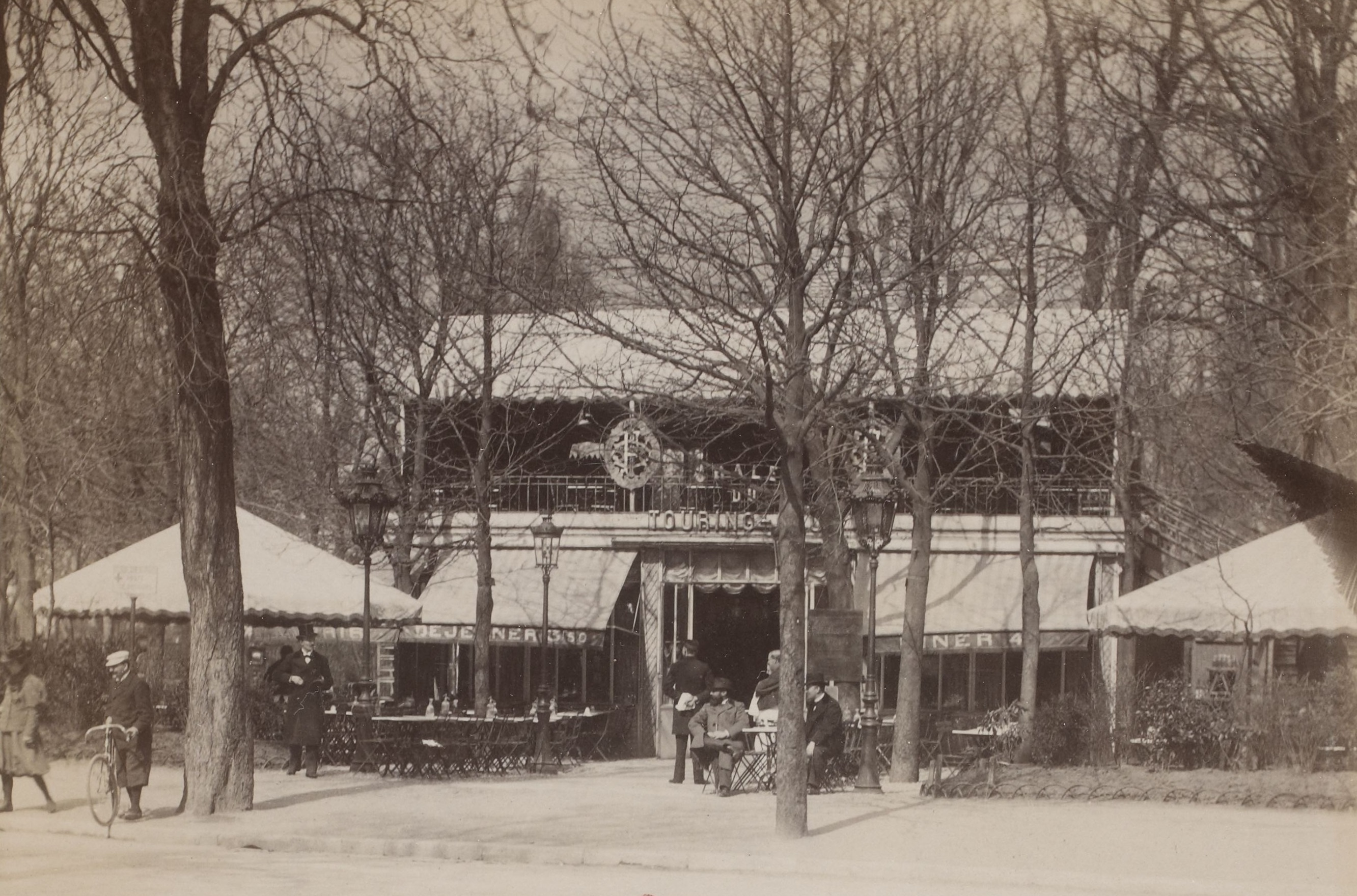 [Collection Jules Beau. Photographie sportive] : T. 6. AnnÃ©e 1898 / Jules Beau : F. 46. Chalet du Touring Club